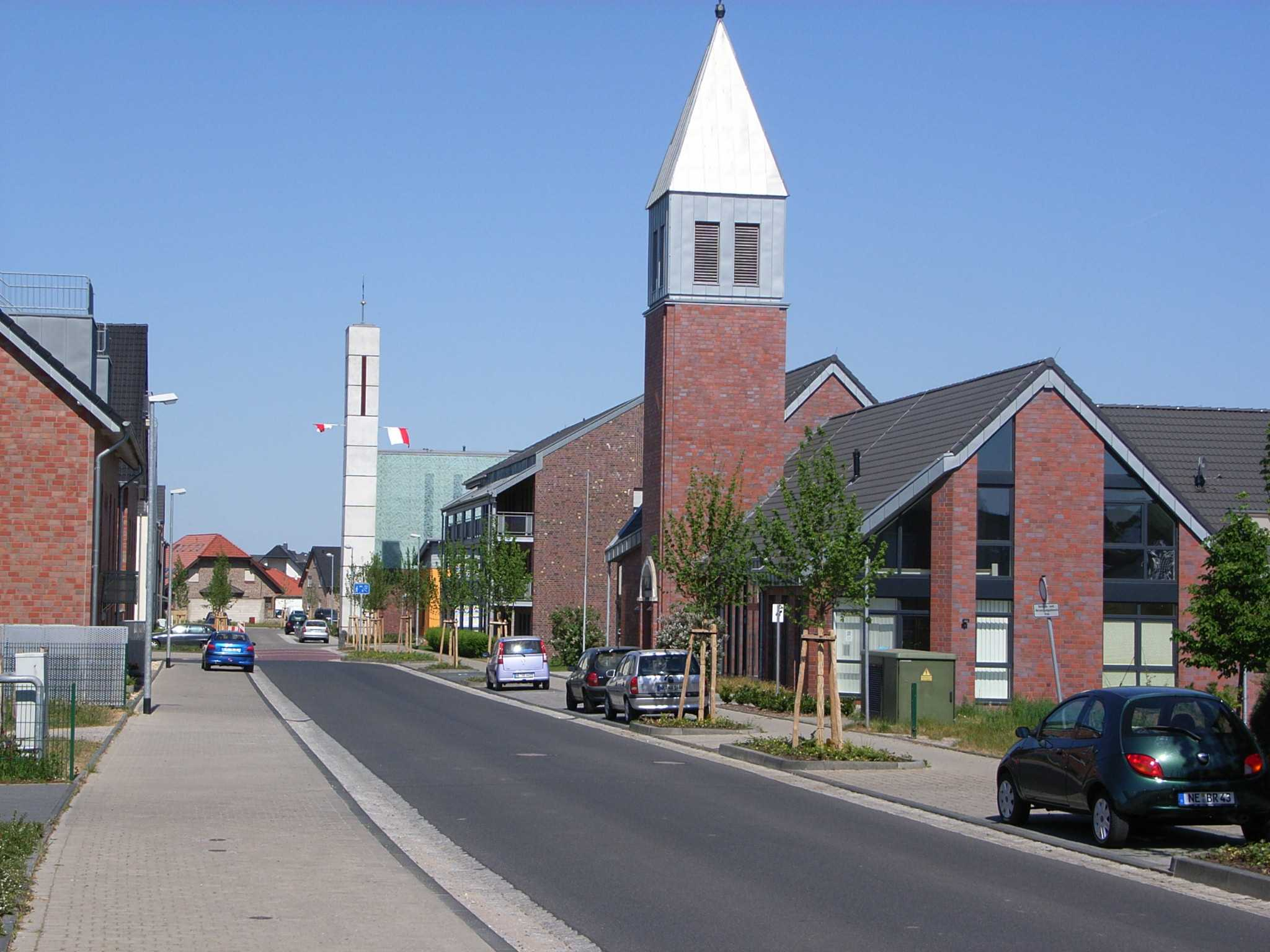 Neu Otzenrath / Spenrath, evangelische und katholische Pfarrkirche